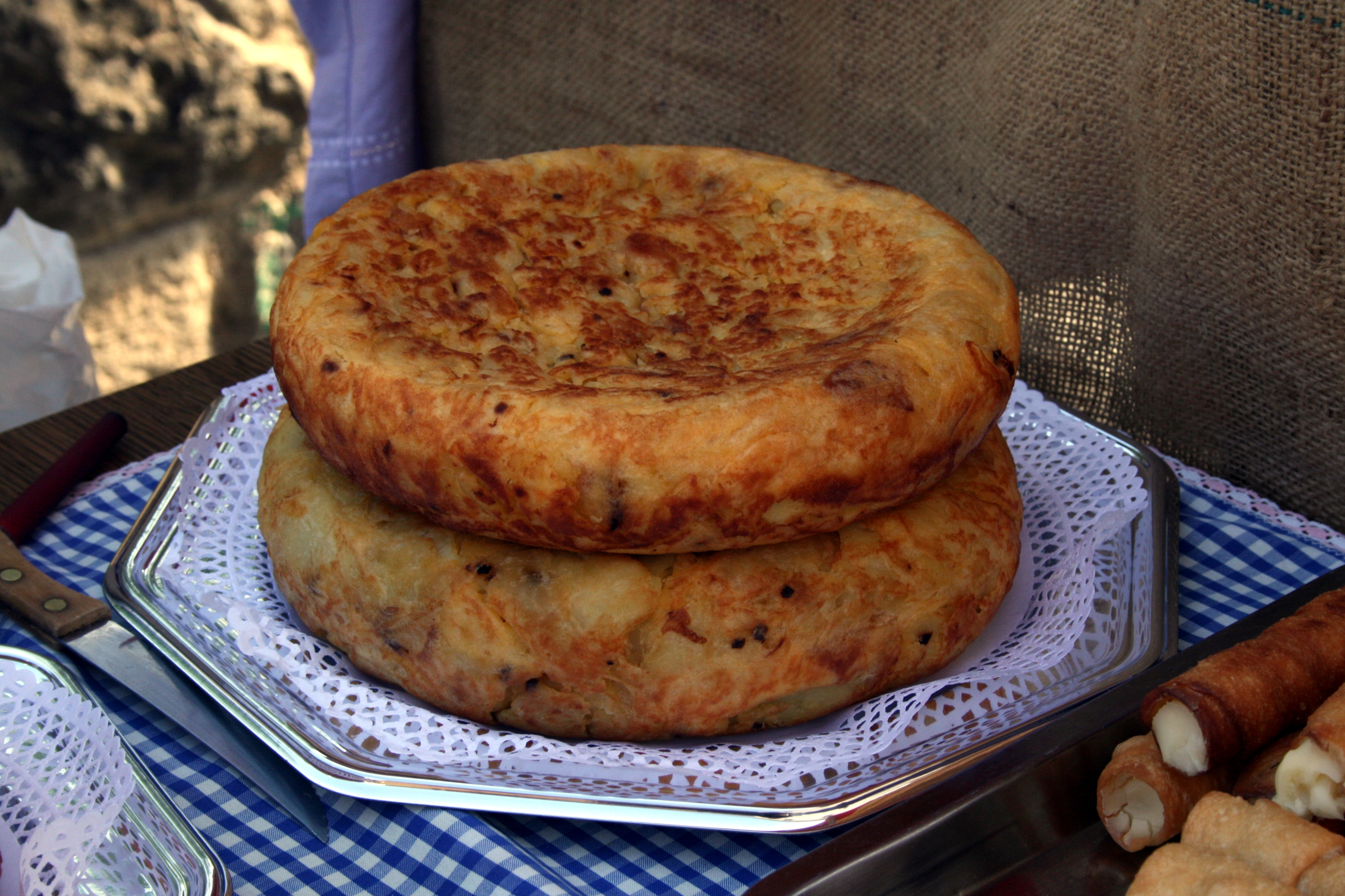 Tortilla de patatas (Asturiana) Pola de Lena